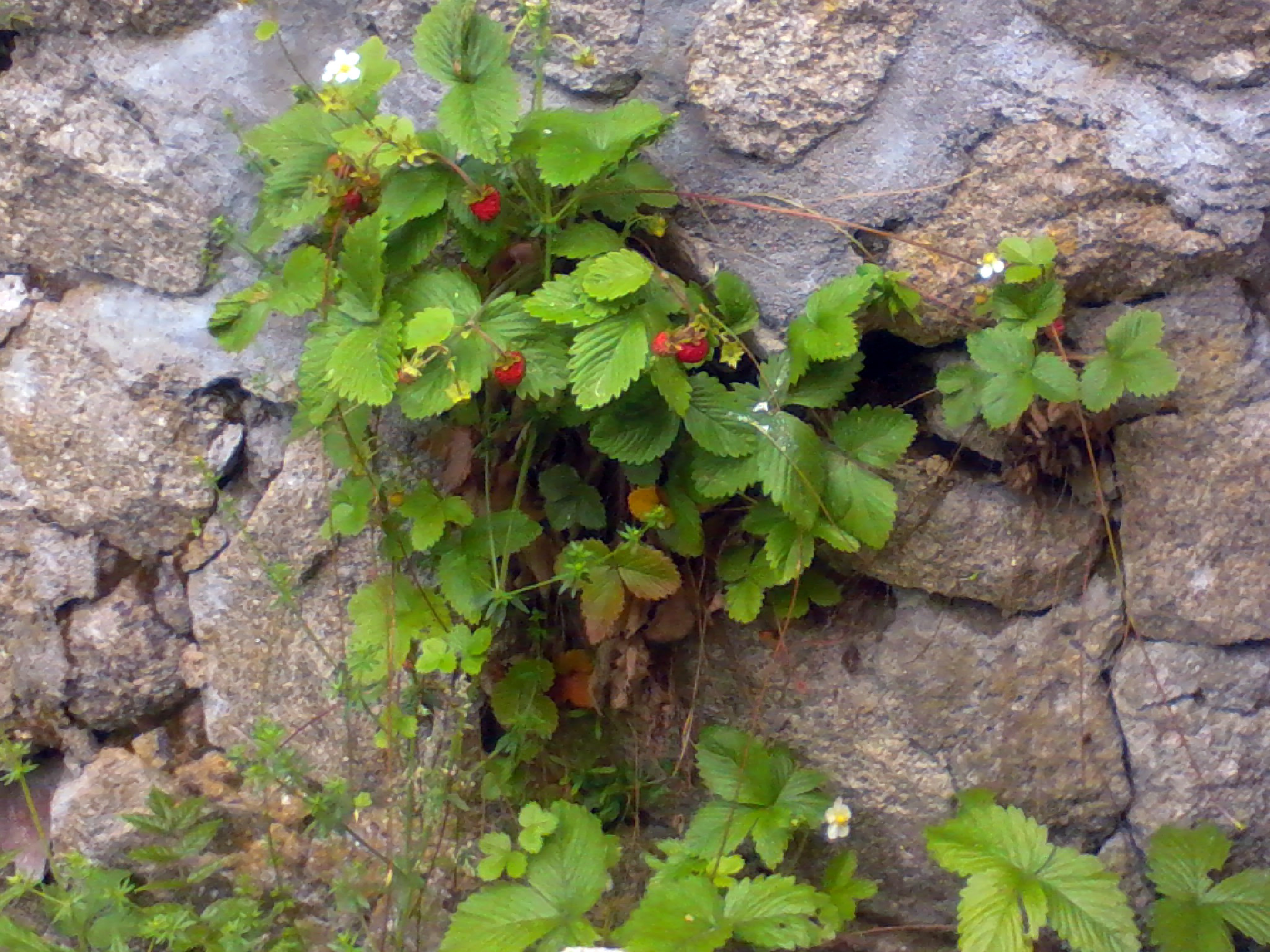 Fraisier des bois colonisant le mur d'un four à pain, en exposition sud-ouest, dans les Monts du Livradois, à 1 000 m d'altitude.